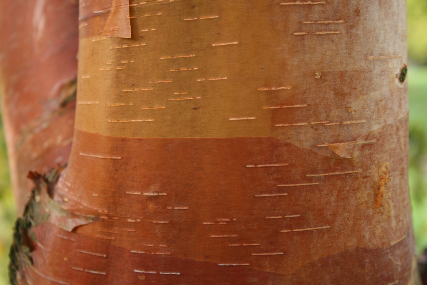 Betula albosinensis: Bark.